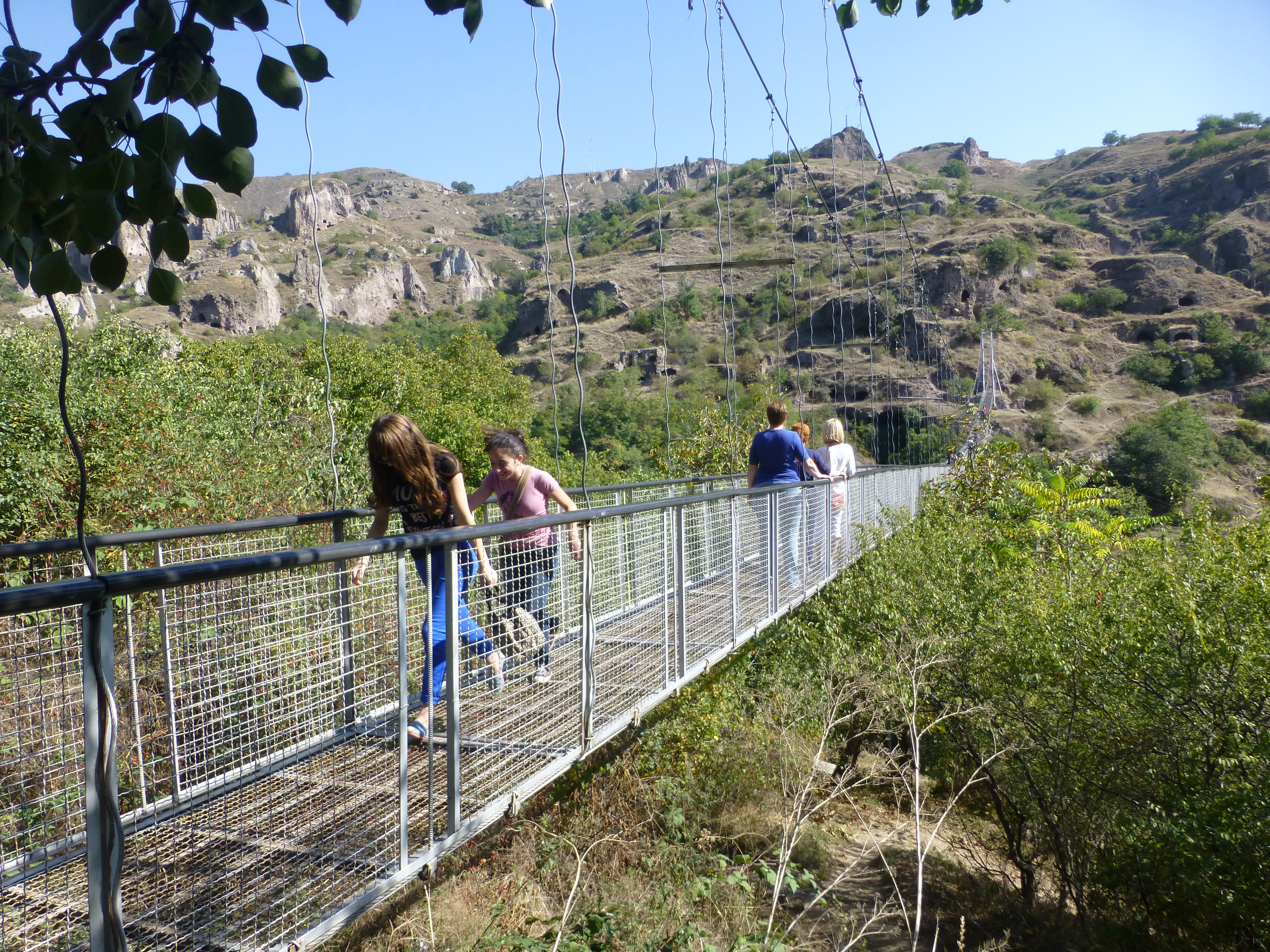 Pont suspendu de Khndzoresk (Arménie).